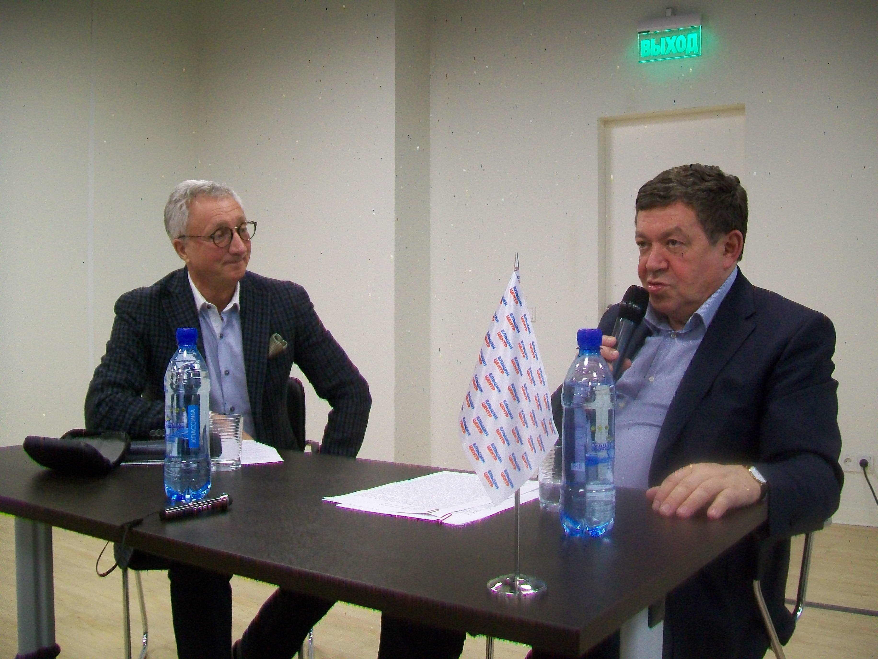 Валерий Выжутович (слева) и Руслан Гринберг в Ельцин-центре. Екатеринбург, 13 апреля 2017 года. Один из диалогов с Выжутовичем